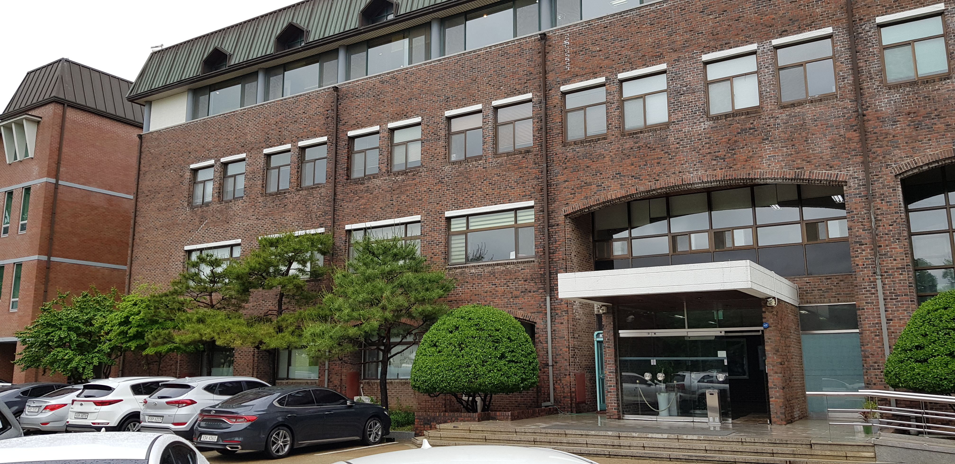 합동신학대학원 대학교 교정